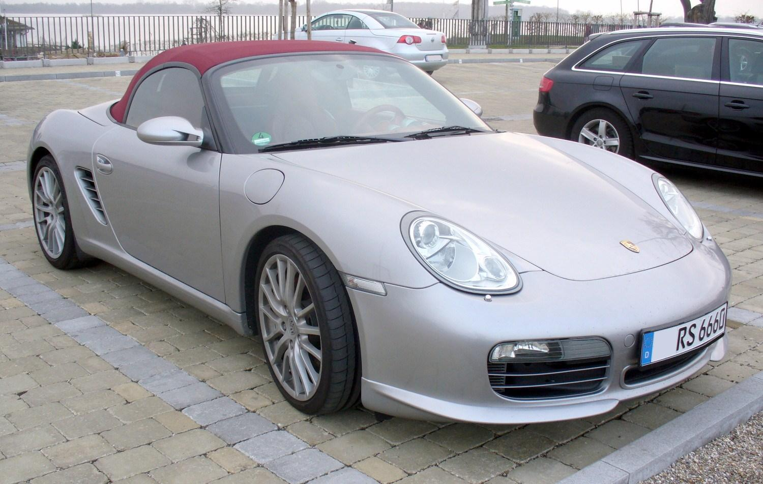 Porsche Boxster 987 RS 60 Spyder